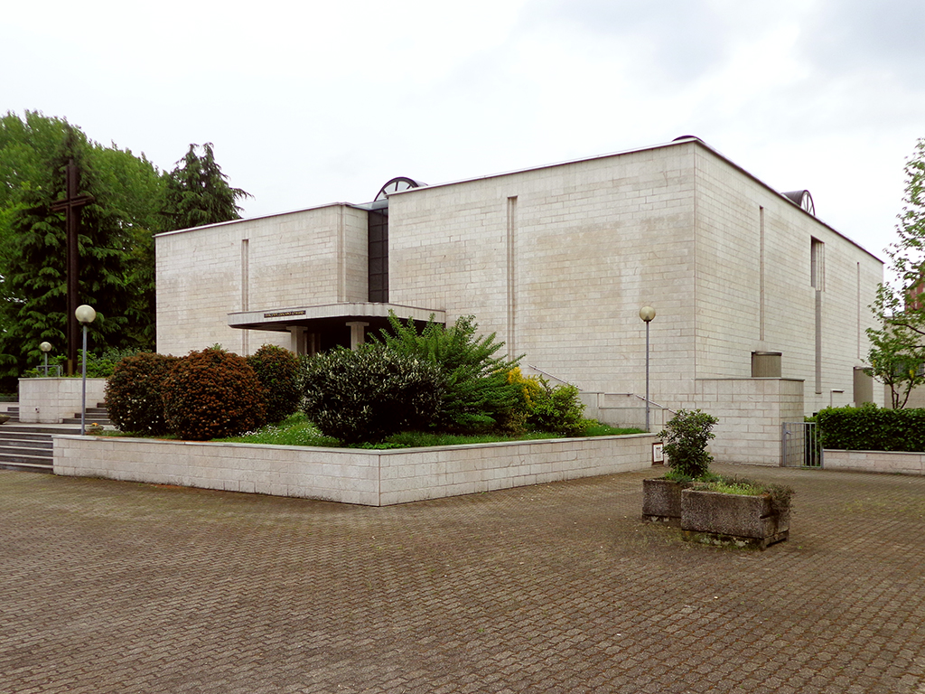 Milano, la chiesa di San Pier Giuliano Eymard.